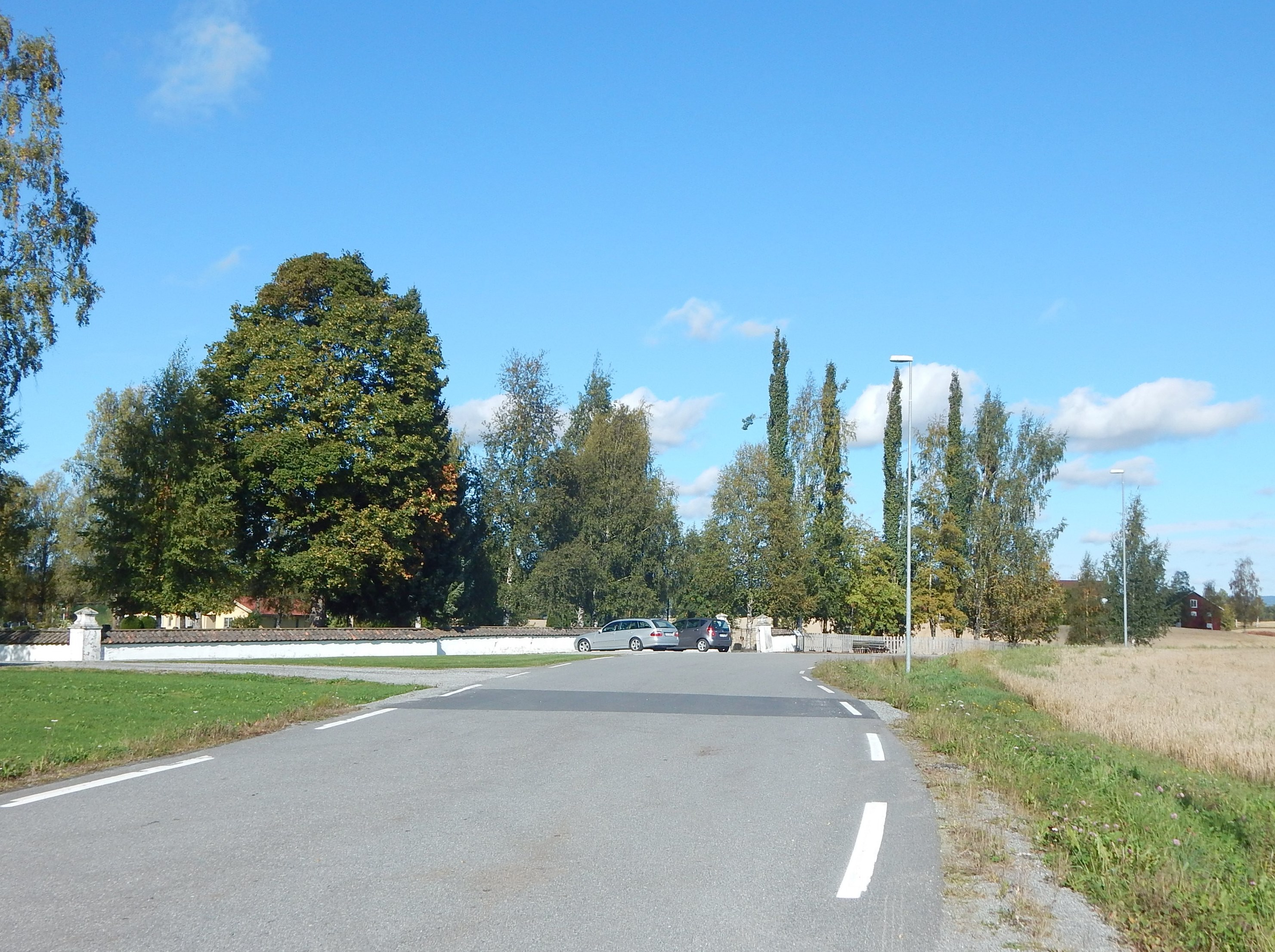 Skrinhagavegen (fylkesvei 1830, tidl. 155) øst for Løten kirke